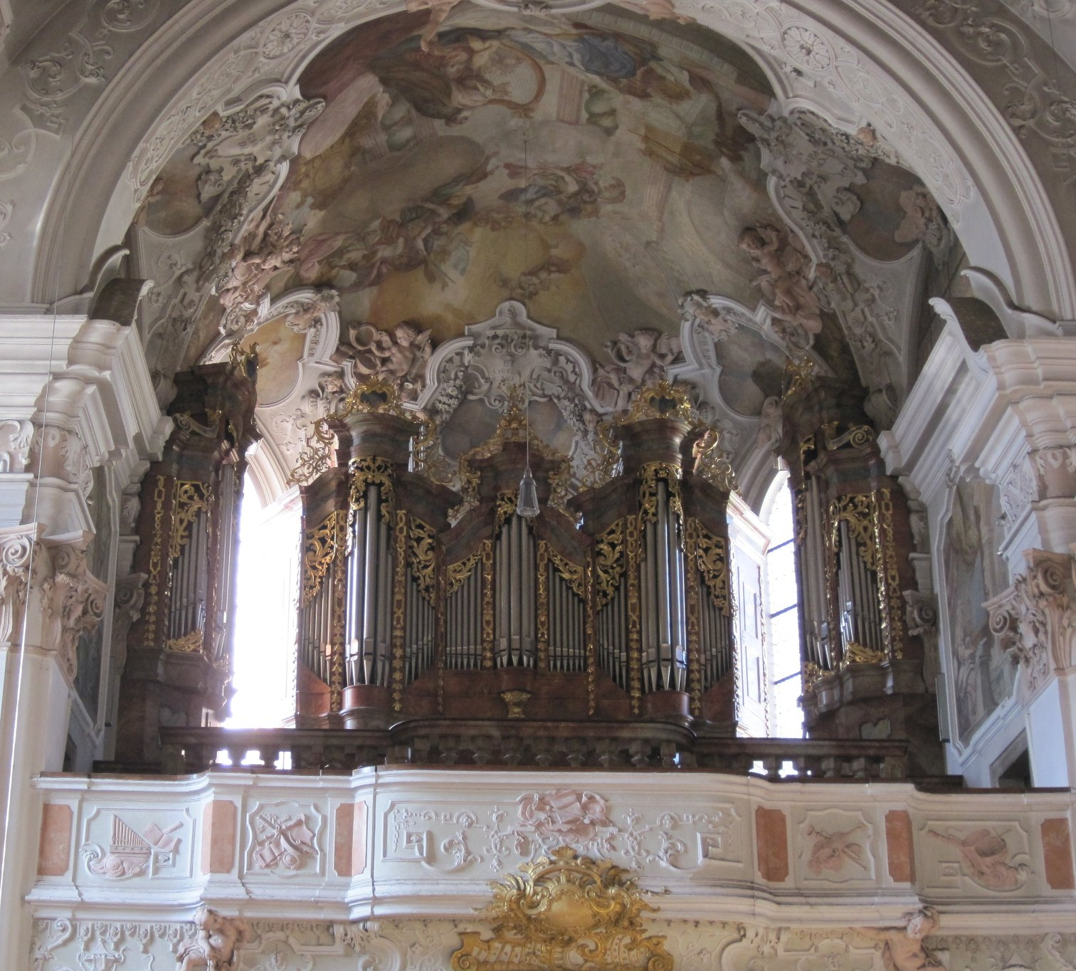 Orgel der Benediktinerabtei Metten